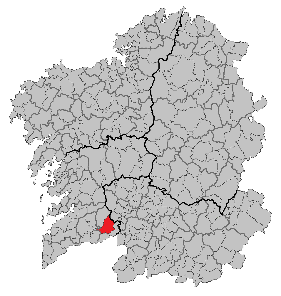 Mapa coa localización do concello de A Cañiza.